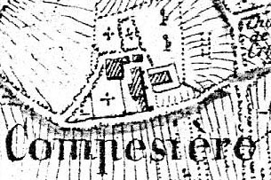 Le hameau de Compesières à Bardonnex dans le canton de Genève, selon la carte « Mayer » de 1830.